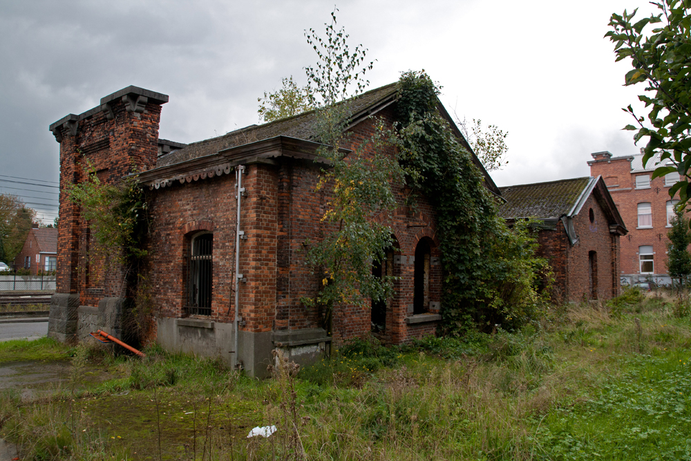 Varvallen poort van het verminkte kazernecomplex te Kontich